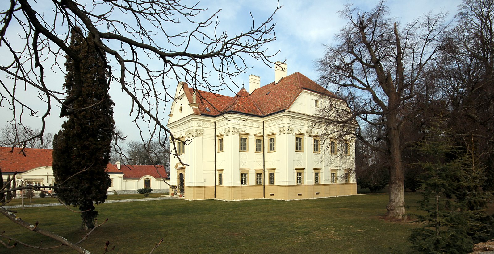 A Szapáry kastély Bükön